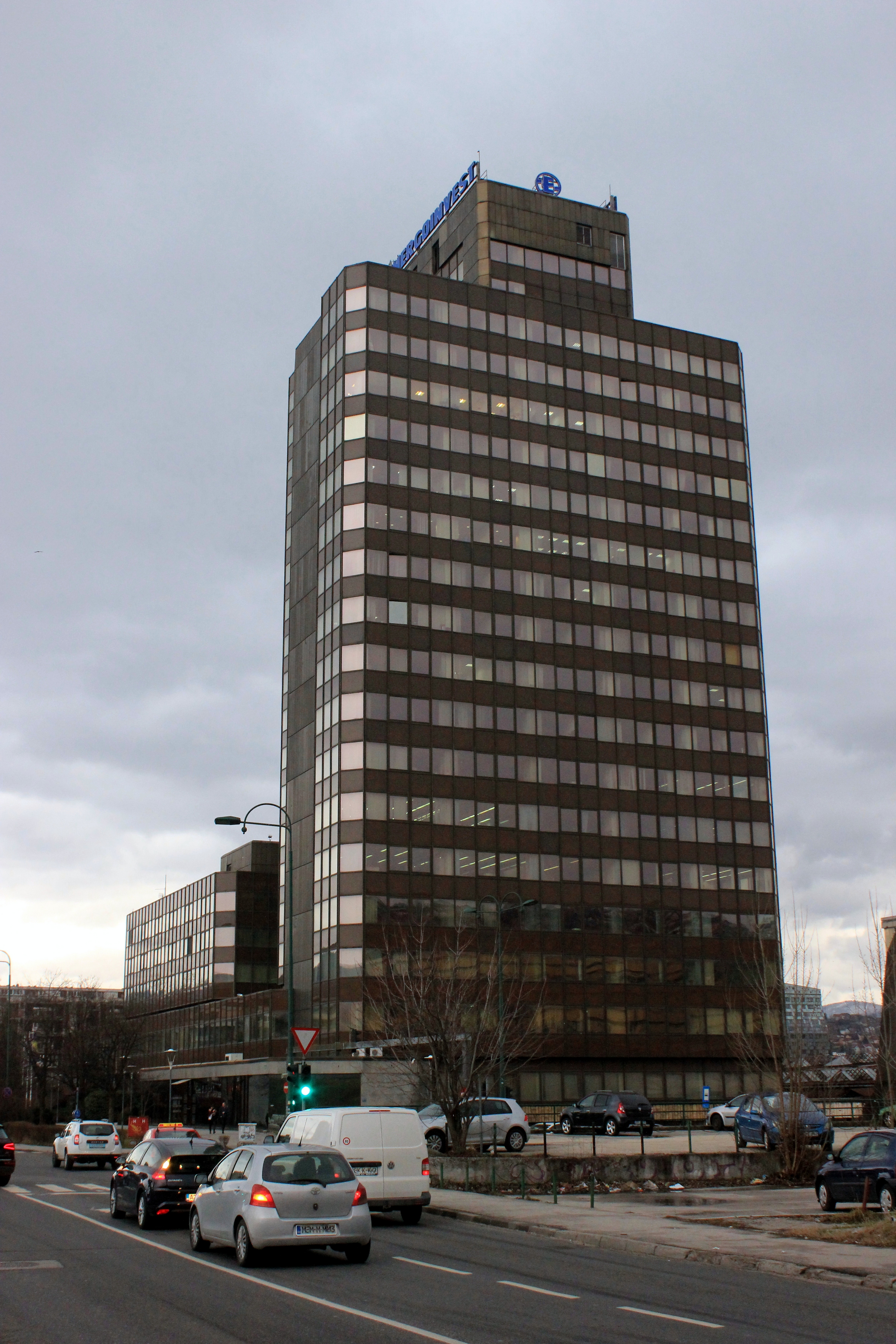 Firmensitz von Energoinvest in Sarajevo.